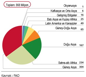 Grafikte, 2010–12 döneminde (bölgelere göre, milyon biriminden) yetersiz beslenmeden etkilenen kişi sayısı gösterilmektedir.